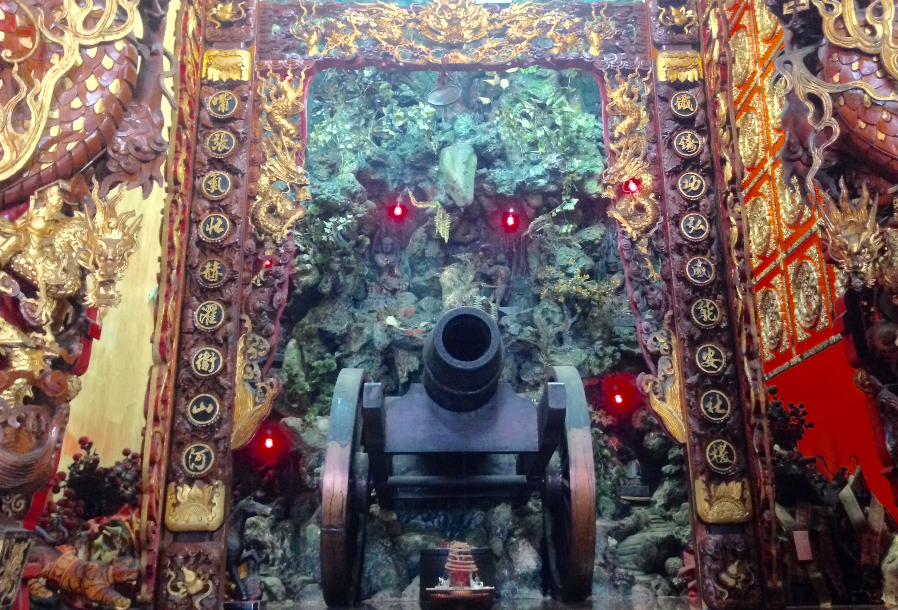 中文（台灣）: 東石鄉福靈宮鐵嘴將軍